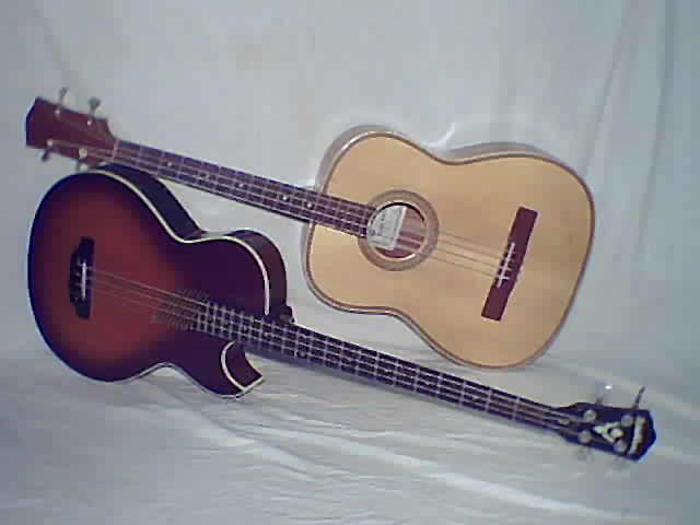 Guitares basses acoustiques (en haut) et électroacoustique (en bas)